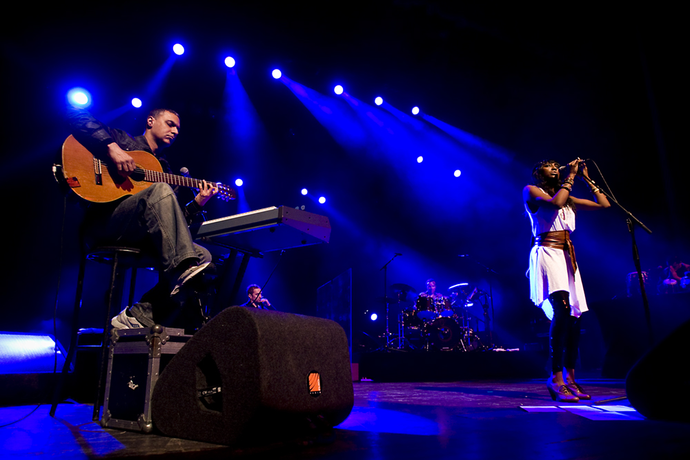 Coliseu dos Recreios, 24 Fevereiro 2009